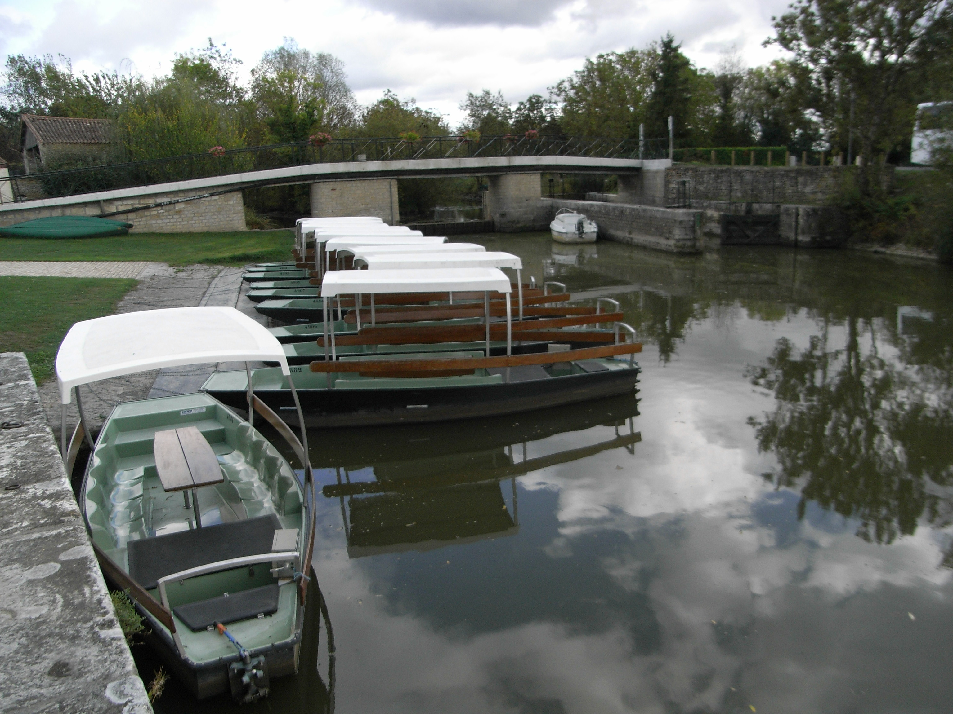 Le port et l'écluse sur la sèvre niortaise à Maillé commune de Vendée (France).